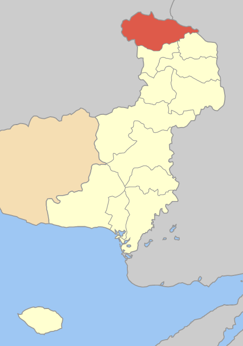 Дем Тригоно на картата на Ном Еврос, Гърция. Locator map of Trigono municipality (Δήμος Τριγώνου) in Evros prefecture (Νομός Έβρου) in Greece.